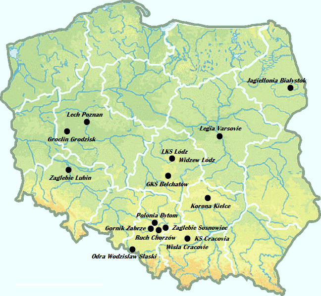 Localisation des 16 clubs du championnat de Pologne édition 2007/08